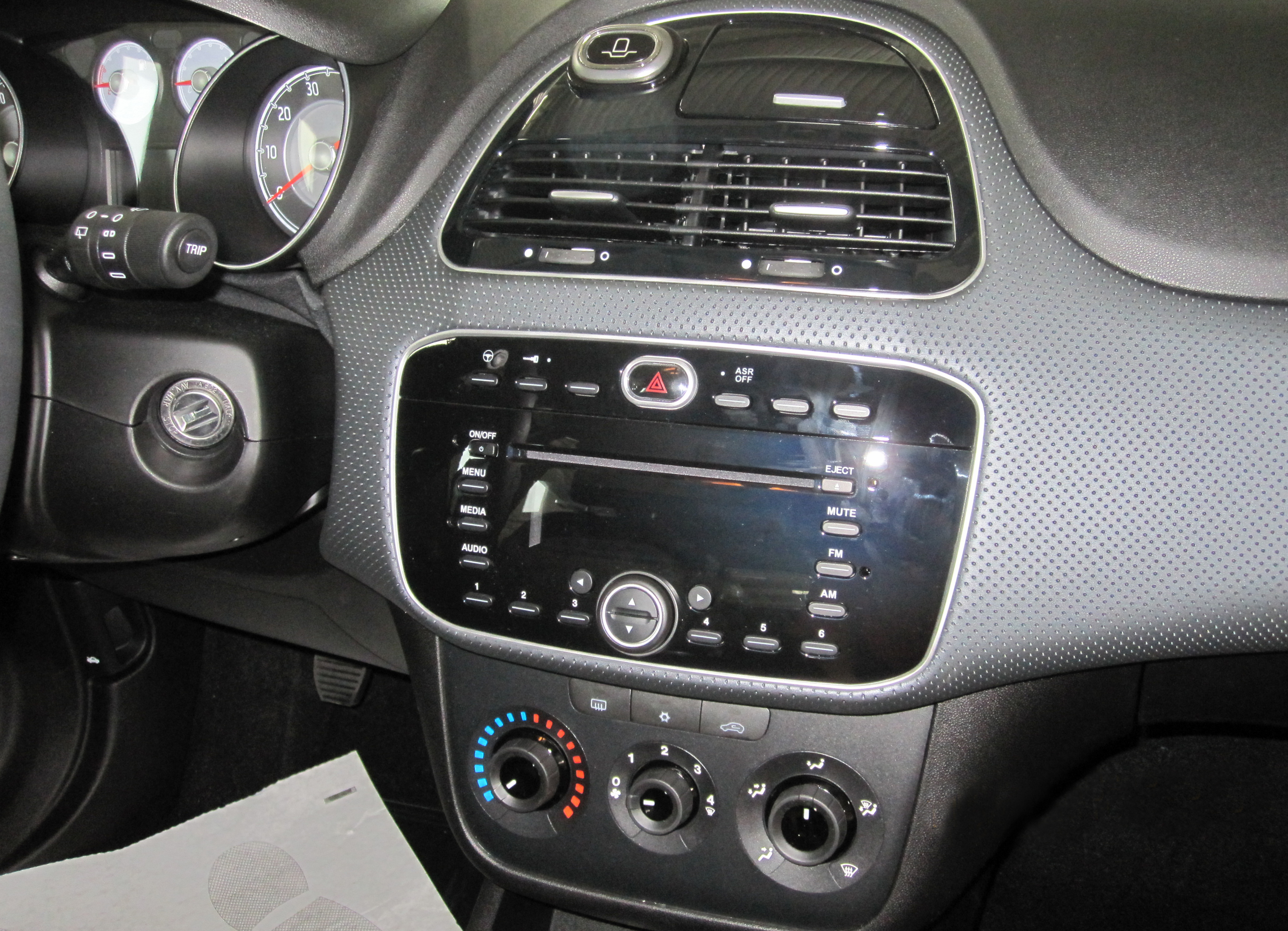 Interni della Fiat Punto Evo